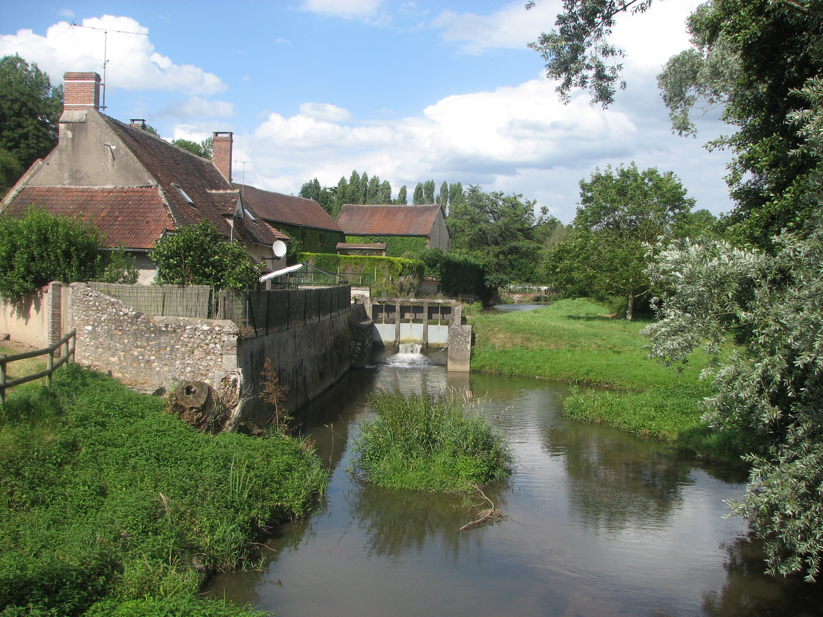 Le Loing à Saint-Privé (89)